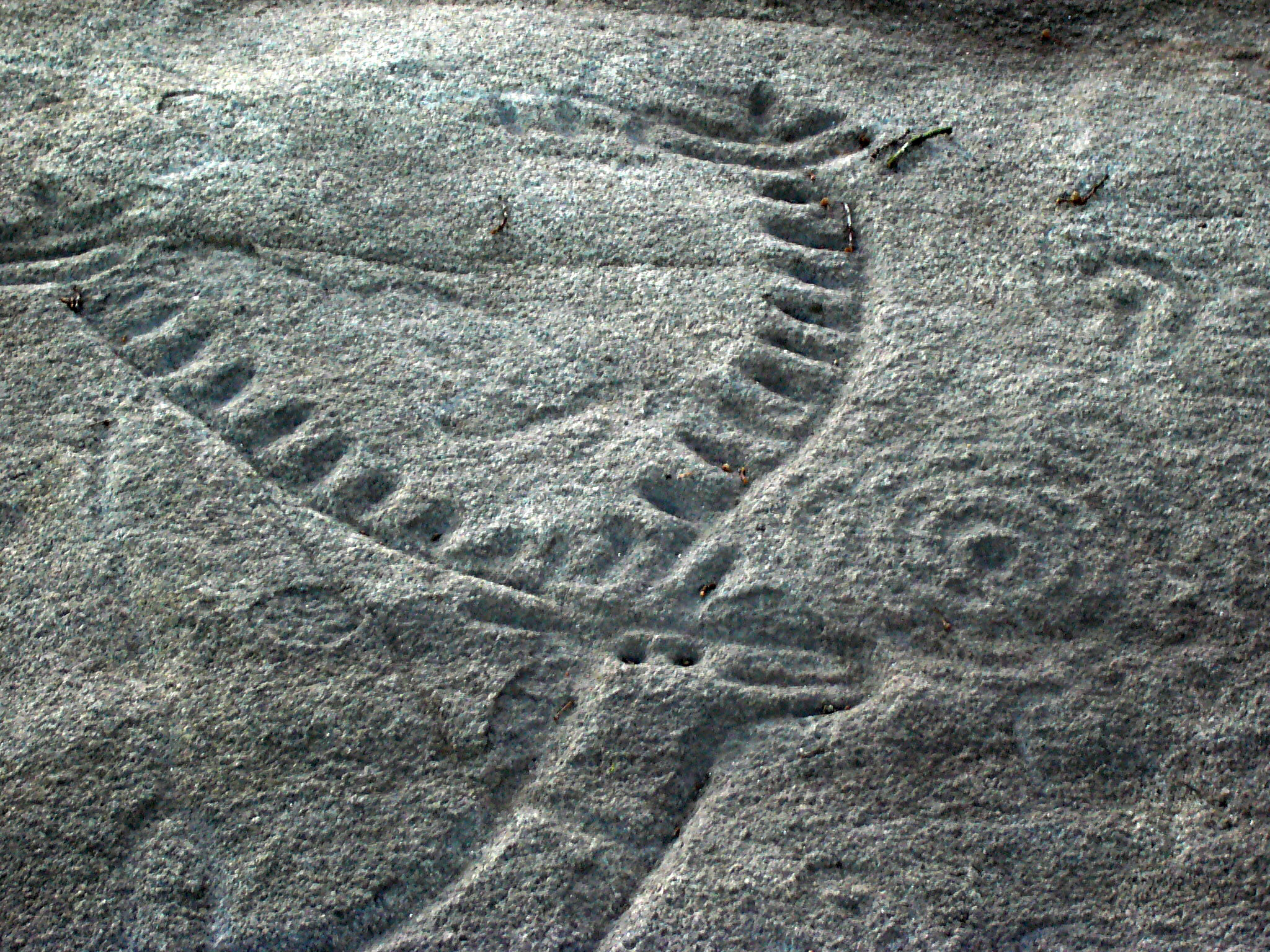 Detalle do cérvido acosado da Laxe dos Carballos" - Campo Lameiro - Pontevedra - Galicia